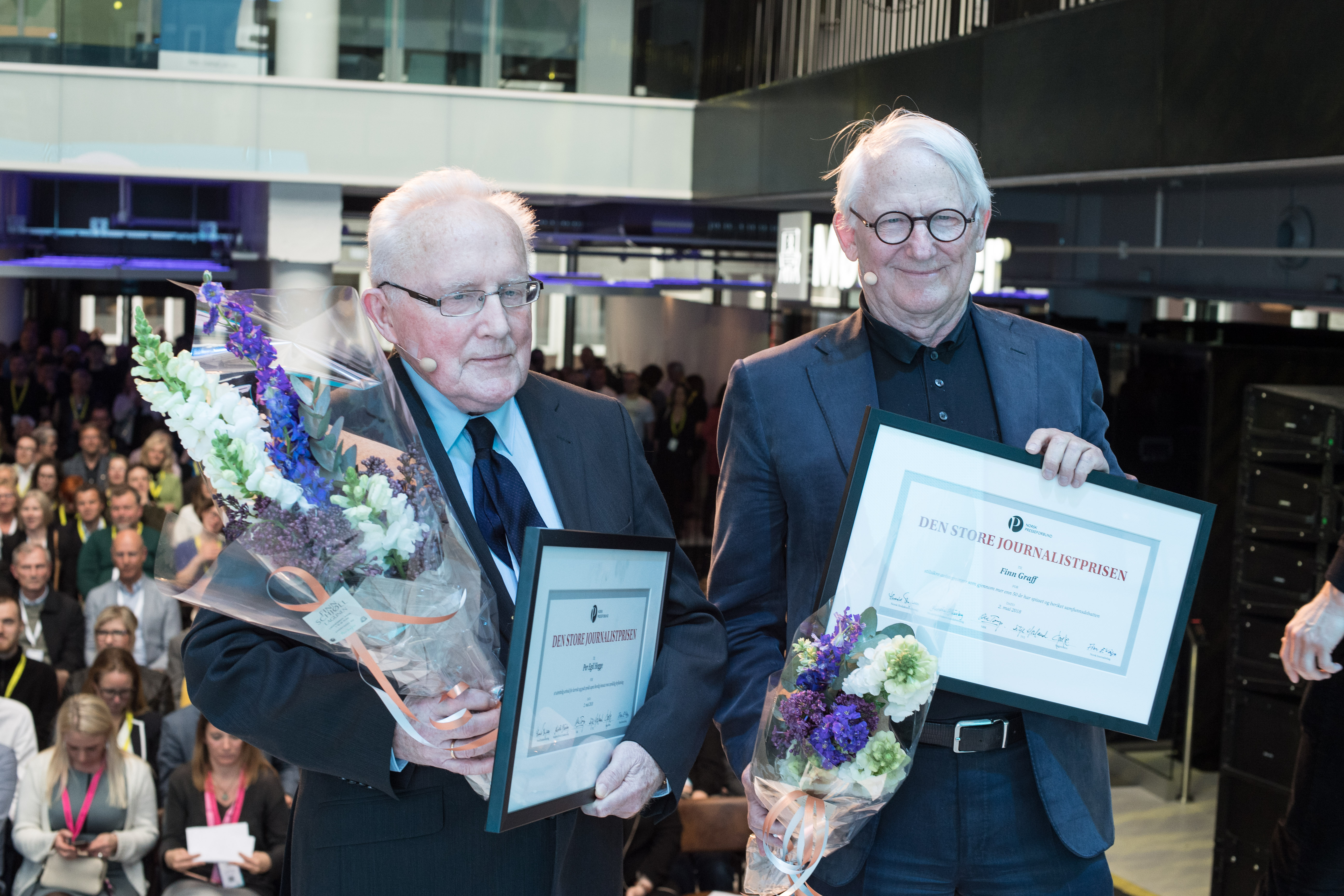 Nordiske Mediedager UNG 2018